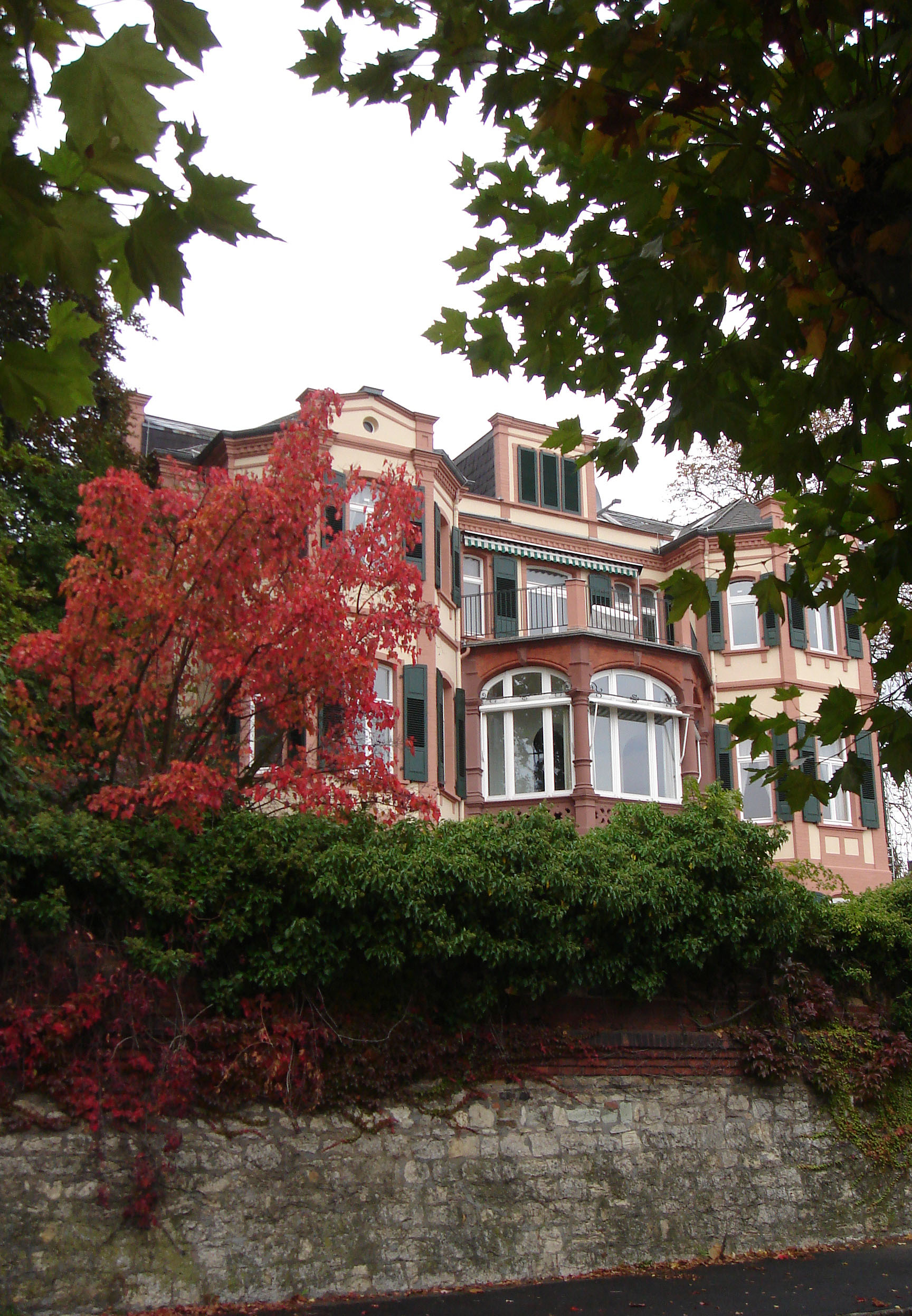 Villa am Rheinufer in Wiesbaden-Biebrich, in der Richard Wagner 1862 seine Meistersinger schuf. Hier porträtierte Cäsar Willich Richard Wagner.